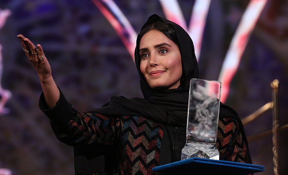 اولین سیمرغ بلورین الناز شاکردوست به عنوان بهترین بازیگر نقش اول زن